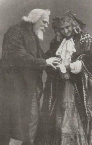 María Guerrero y Fernando Díaz de Mendoza en una escena del tercer acto de la obra de teatro La flor de la vida, de los Hermanos Álvarez Quintero